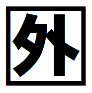 日本の競馬に出走する外国馬に表記される印。